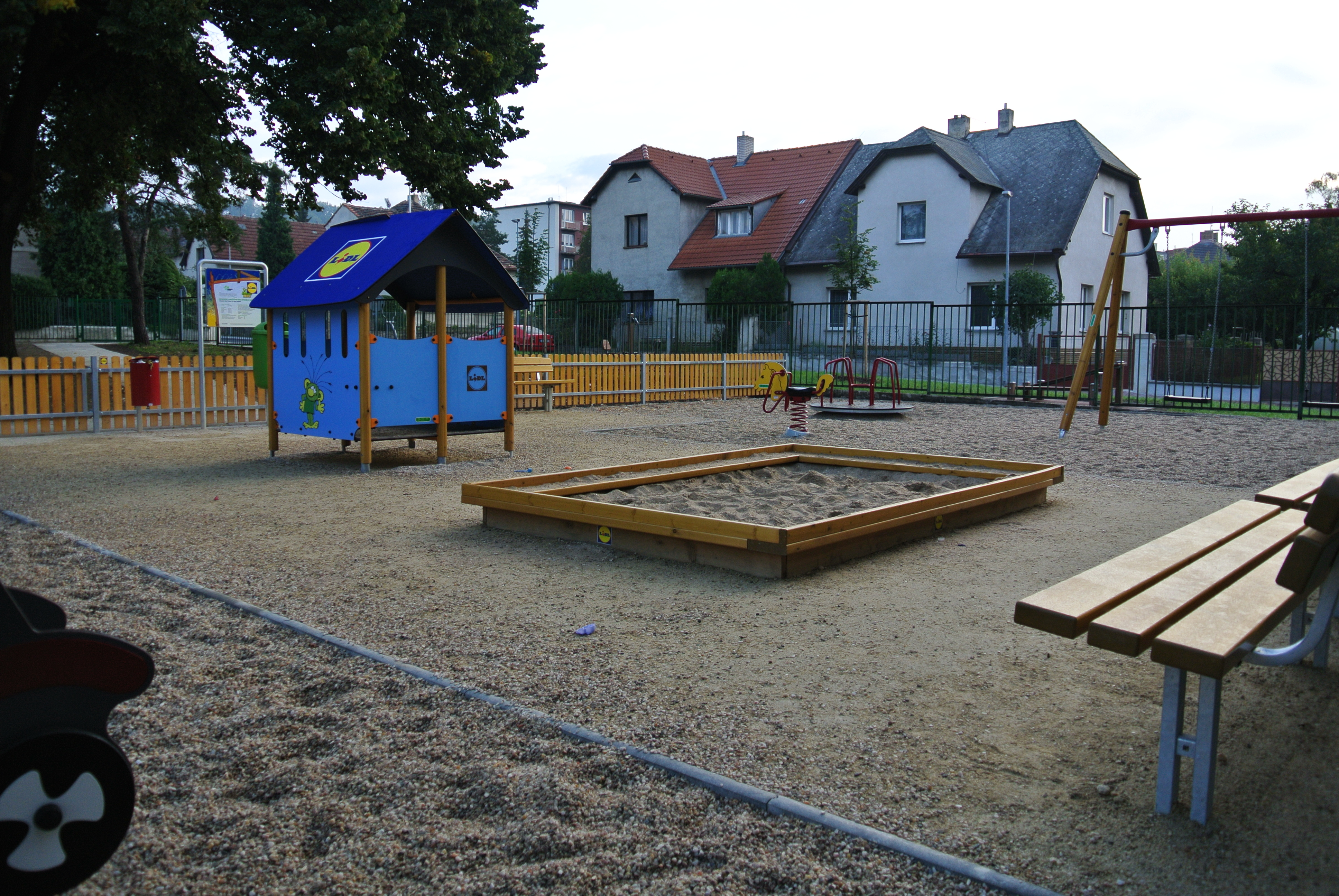 Rákosníčkova hřiště - Hloubětín